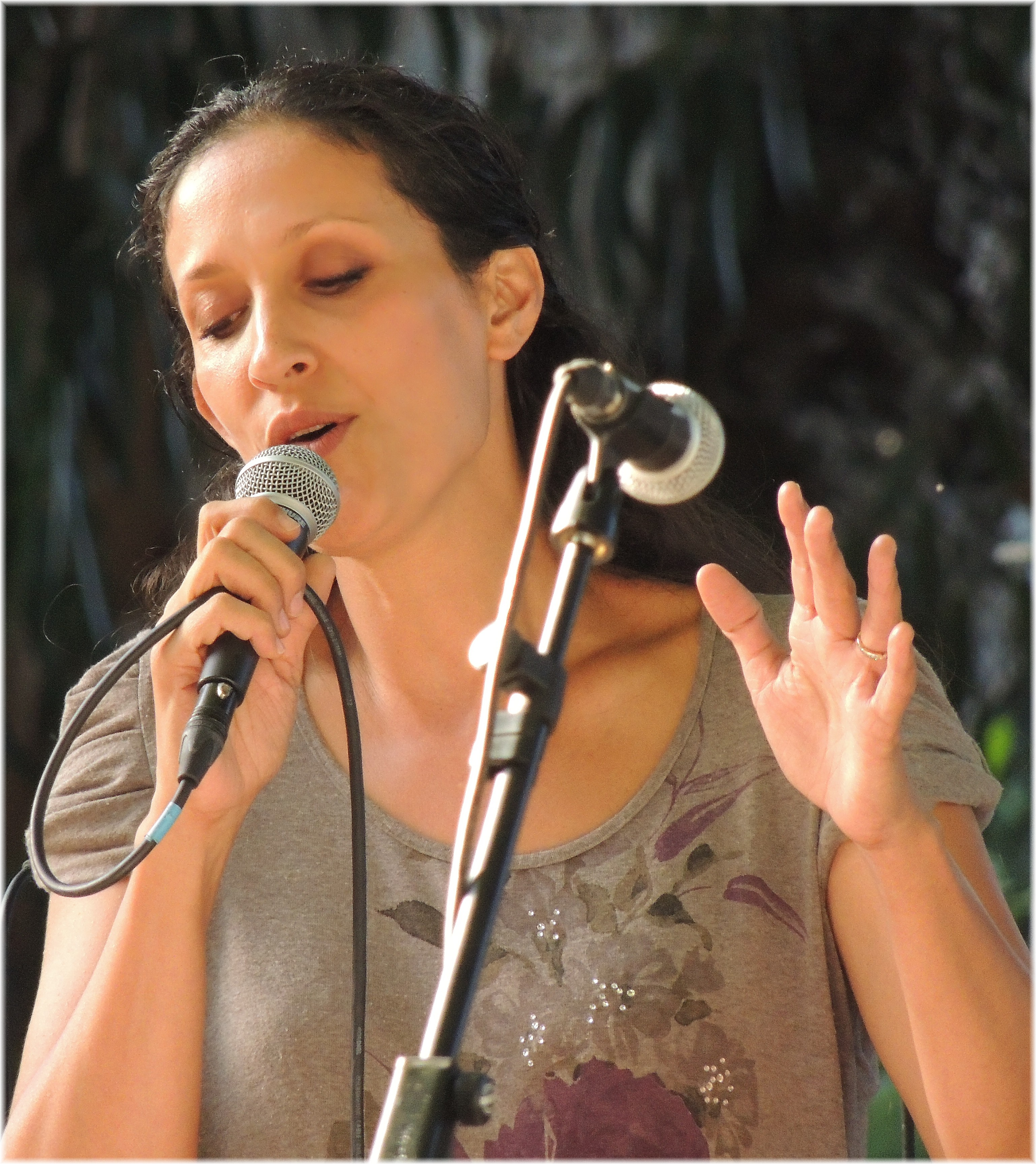 Rosa Cedrón, nada en Monforte de Lemos en 1972, é unha cantante galega e intérprete de violoncello, coñecida por ser a voz durante nove anos no grupo Luar na lubre, así como en colaborar en discos de músicos como Mike Oldfield. Axiña se mudaría á cidade da Coruña. A súa vocación xa desde nena foi o violoncello, e pertenceu á Orquestra de Cámara Municipal da Coruña, e máis tarde foi profesora de música en Ferrol Comezou a colaborar con Luar na Lubre, inicialmente como cellista, mais acabou sendo tamén vocalista e con grande fortuna, feito que observaría o coñecido músico Mike Oldfield convidándoa a participar na gravación de Tubular Bells III, así como o feito de incrementar o éxito do grupo de música folk. Con Luar na Lubre, Rosa desenvolveu un amplo labor durante 9 anos: actuou nos mellores escenarios, gravou varios discos e recolleu premios de recoñecemento á súa música. Mentres tanto, simultaneou a súa intensa carreira con outros proxectos: as gravacións co grupo de música famenca Barbería del Sur, a participación nas B.S.O. de Blanca Madison ou Ilegal puxeron a proba a súa polivalencia. No ano 2005 deixa o grupo Luar na lubre e a partir dese momento dedícase á súa carreira en solitario e publicou o seu primeiro disco en solitario Entre dous mares en 2007 Galipedia.